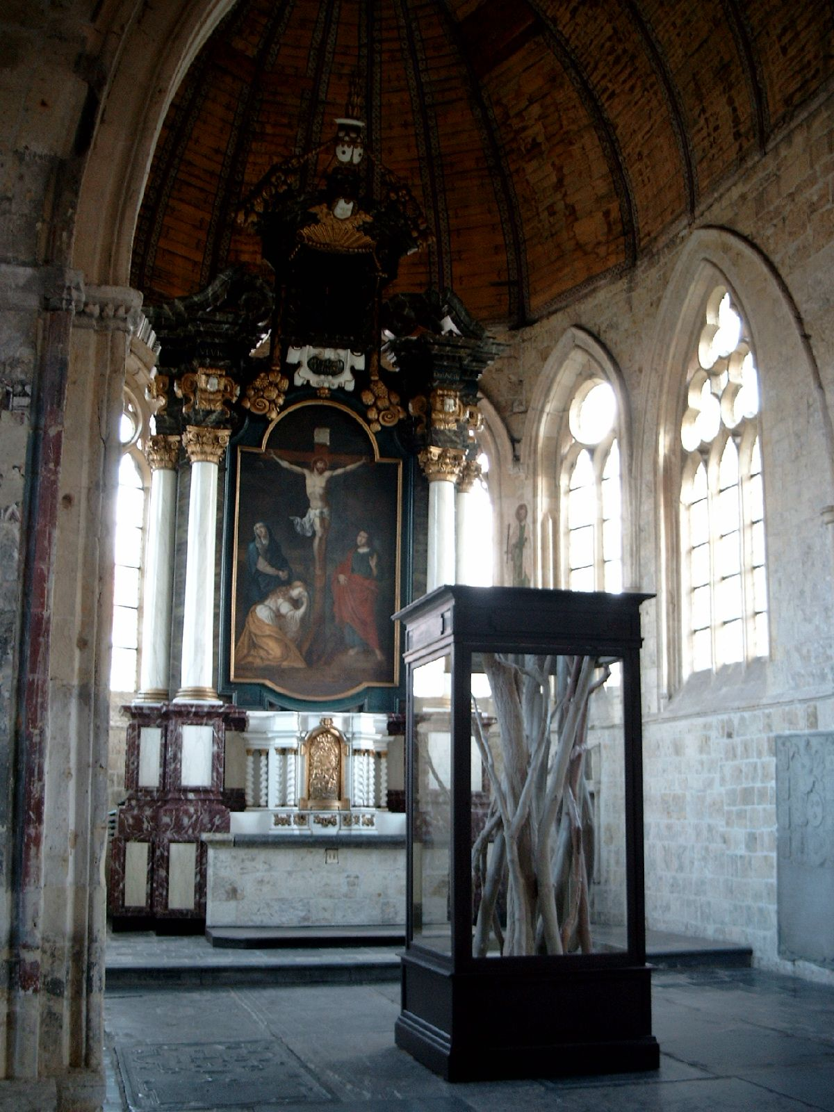 Zicht interieur Begijnhofkerk Sint-Truiden met "Glazen kast met bomen in was" van Berlinde De Bruyckere